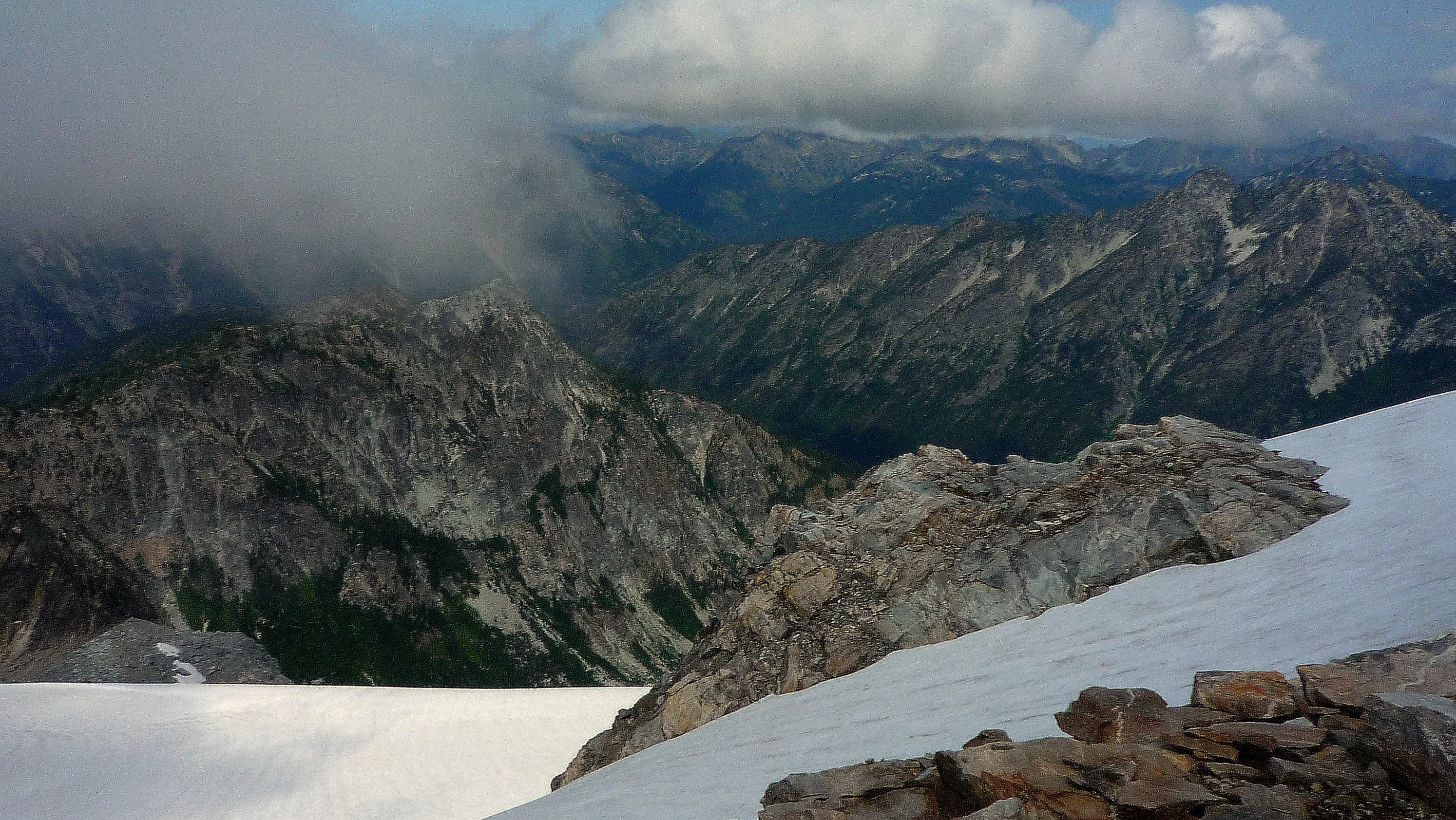 Sandalee Glacier